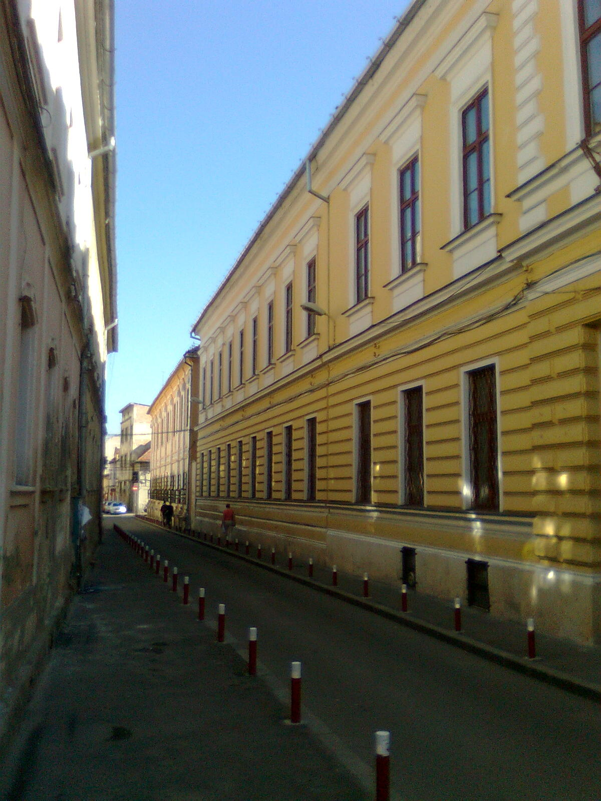 Hermann Oberthről elnevezett utca (volt Minorita utca) Kolozsváron